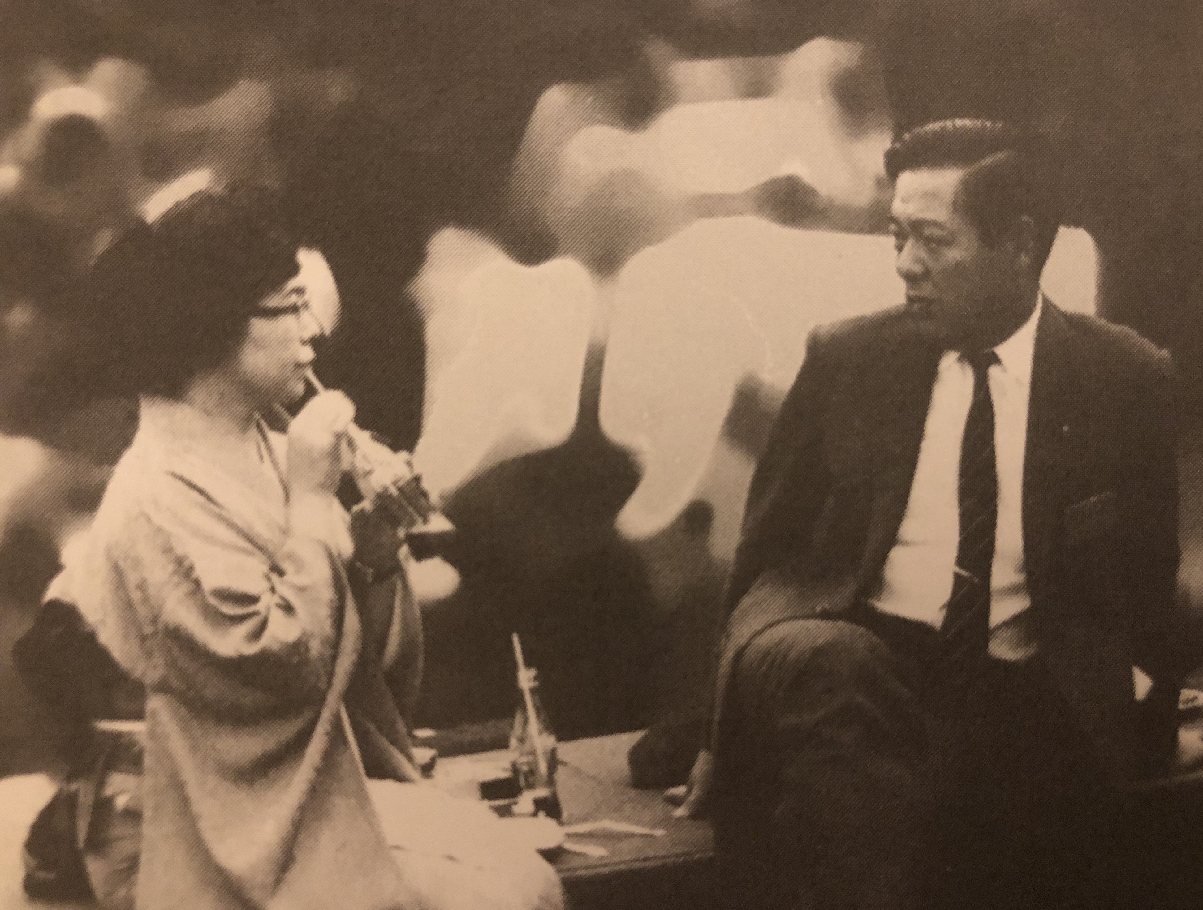 藤間勘五郎と妻